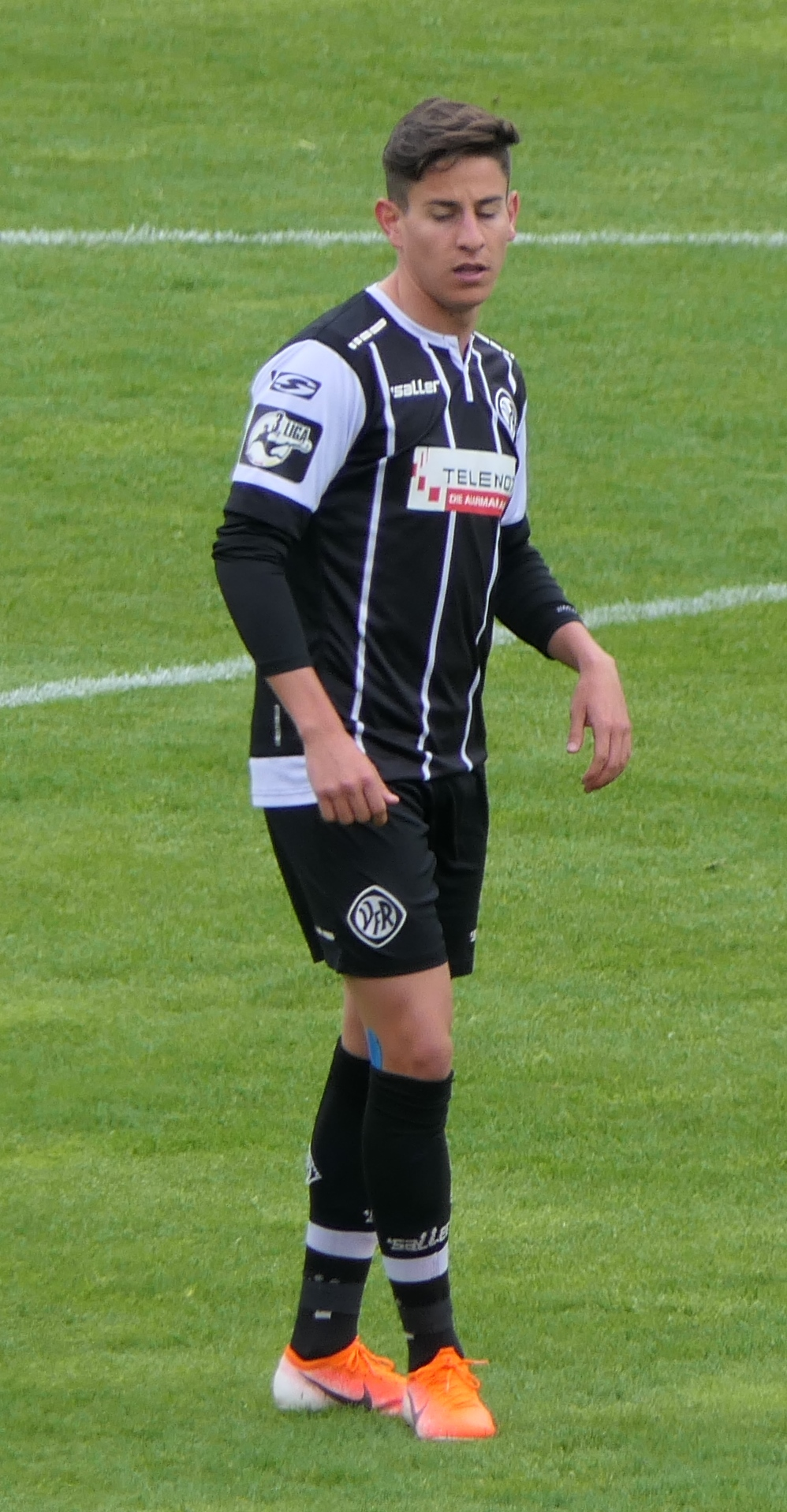 Der Fussballprofi Nicolás Sessa im Trikot des VfR Aalen beim Heimspiel gegen Eintracht Braunschweig am 05.05.2019.